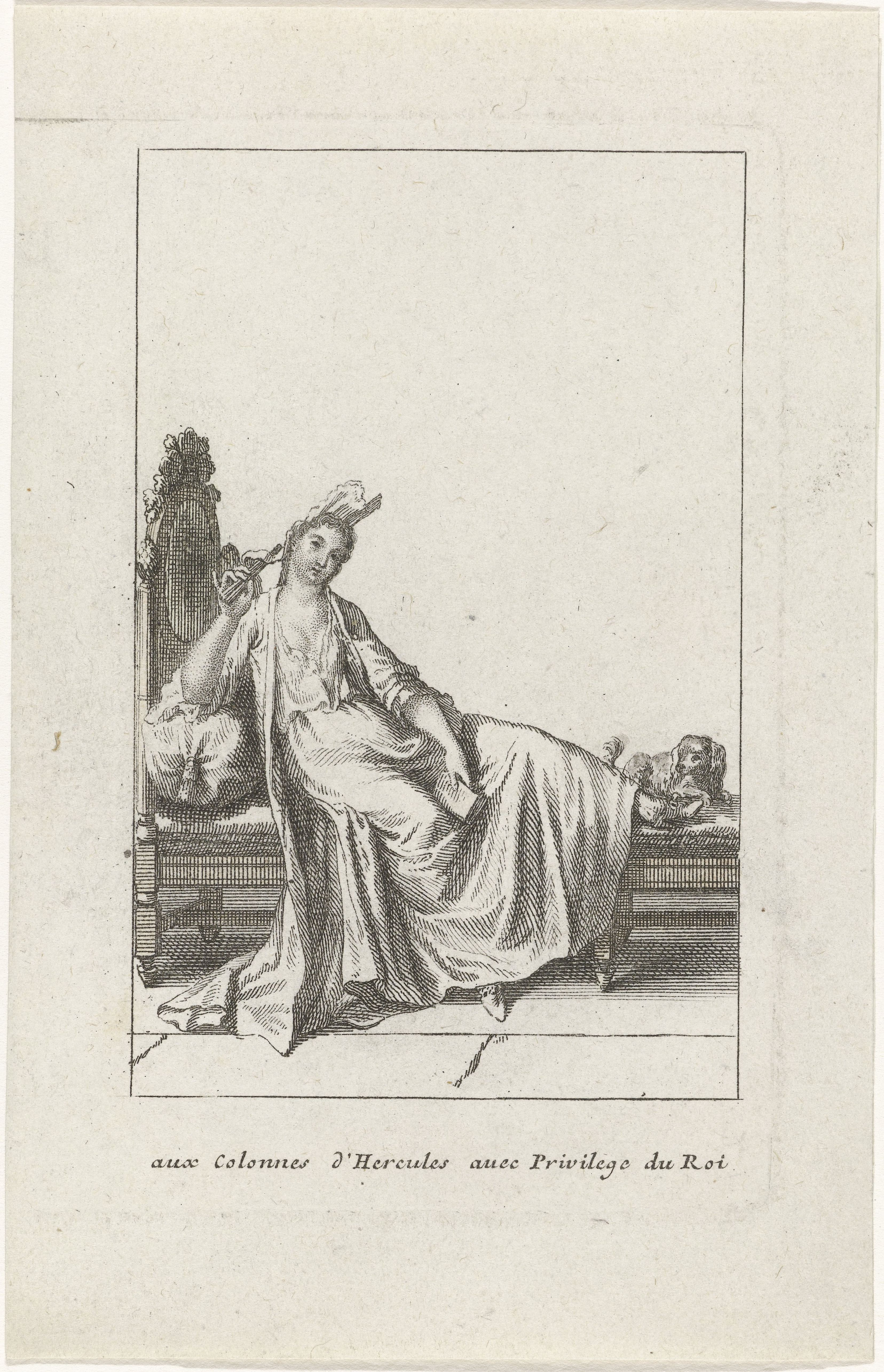 IdentificatieTitel(s): Dame met fontange, en négligé, liggend op sofa., een hondje aan de voetenObjecttype: prent kostuumprent Objectnummer: RP-P-2009-1087Opschriften / Merken: adres, midden onder in de marge, gegraveerd: ‘aux Colonnes d'Hercules’Omschrijving: Vrouw, zittend op een chaise longue, één voet op de bank en één op de grond, gekleed in een ochtendjapon. Zij draagt een open manteau met engageantes op een hemd en rok, afgezet met een versierde band. Op het hoofd een fontange met slippen. In de rechterhand een vouwwaaier, in de linkerhand een boekje. Muiltjes aan de voeten. Bij het voeteneinde een hondje. De prent is een verkleine kopie naar de prent "Dame en Deshabillé a Son Lever" uit de reeks van 25 kostuumprenten, uitgegeven door J. Mariette, Parijs, 1696-1708.VervaardigingVervaardiger: prentmaker: anoniemuitgever: Denis Mariette (vermeld op object)Plaats vervaardiging: ParijsDatering: na 1698 - ca. 1700Materiaal: papier OnderwerpWat: dress, gown (+ women's clothes)head-gear: fontange (+ women's clothes)head-gear: fontange (+ lace used for clothes)styles of hairdress (with NAME) - AA - ~ womensleeves (+ women's clothes)dogcouch, sofa, setteeVerwerving en rechtenCredit line: Aankoop uit het F.G. Waller-FondsVerwerving: aankoop 30-sep-2009Copyright: Publiek domein